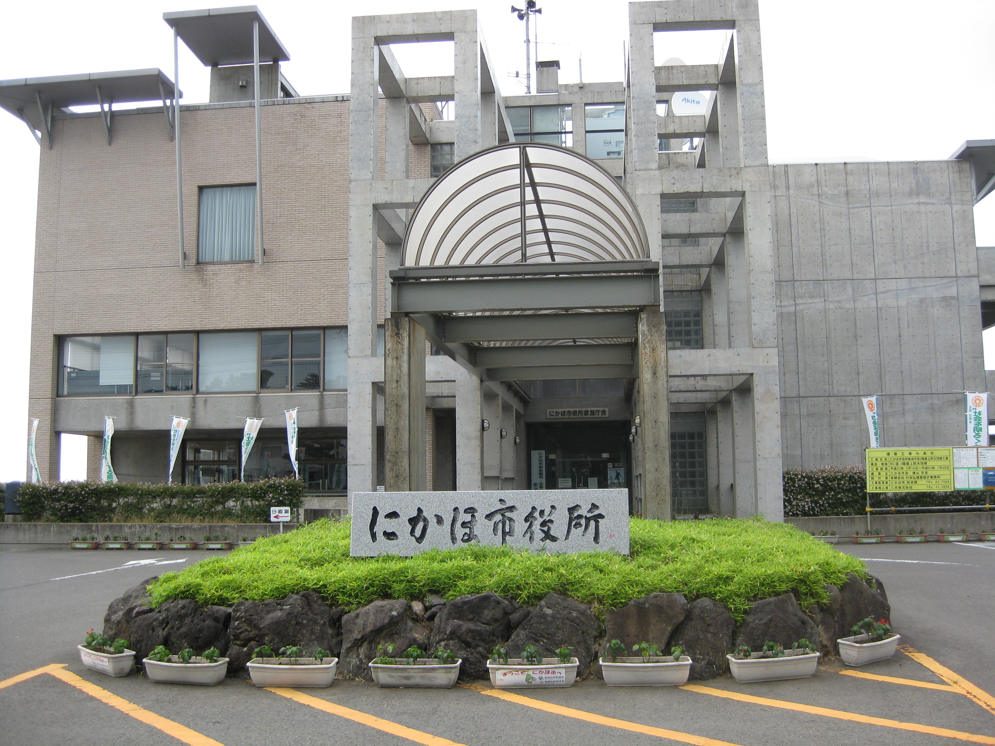 にかほ市役所